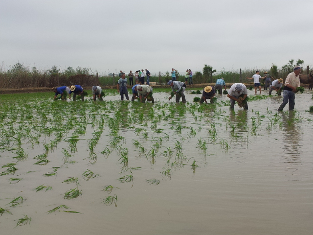 Plantadors d'arròs a la Festa de la Plantada, festa tradicional de l’arròs que s’organitza a Deltebre. Tradicionalment, l’arròs es conreava mitjançant el mètode del trasplantament i el treball de l’home i els animals.